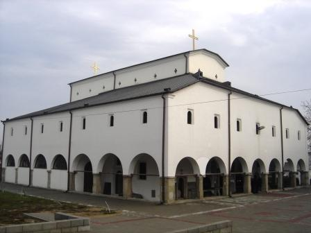 Саборни храм Autor: Nemanja Todorović, Beograd